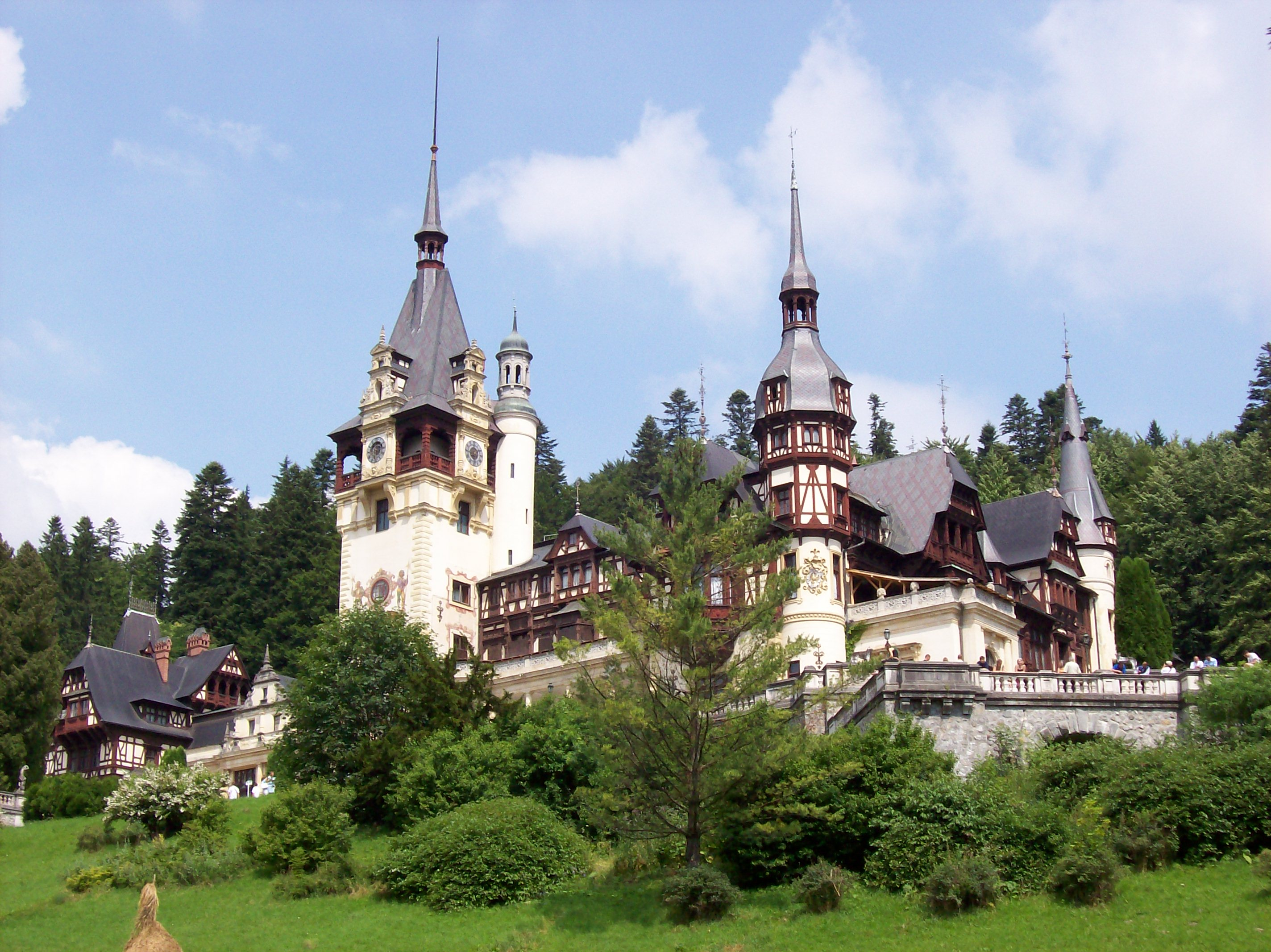 Categorie:Afbeelding Roemenië 01